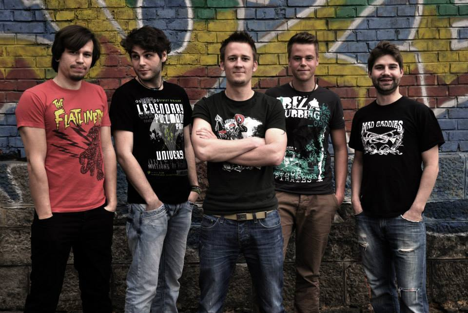 Bandfoto der Bandbesetzung seit 2012